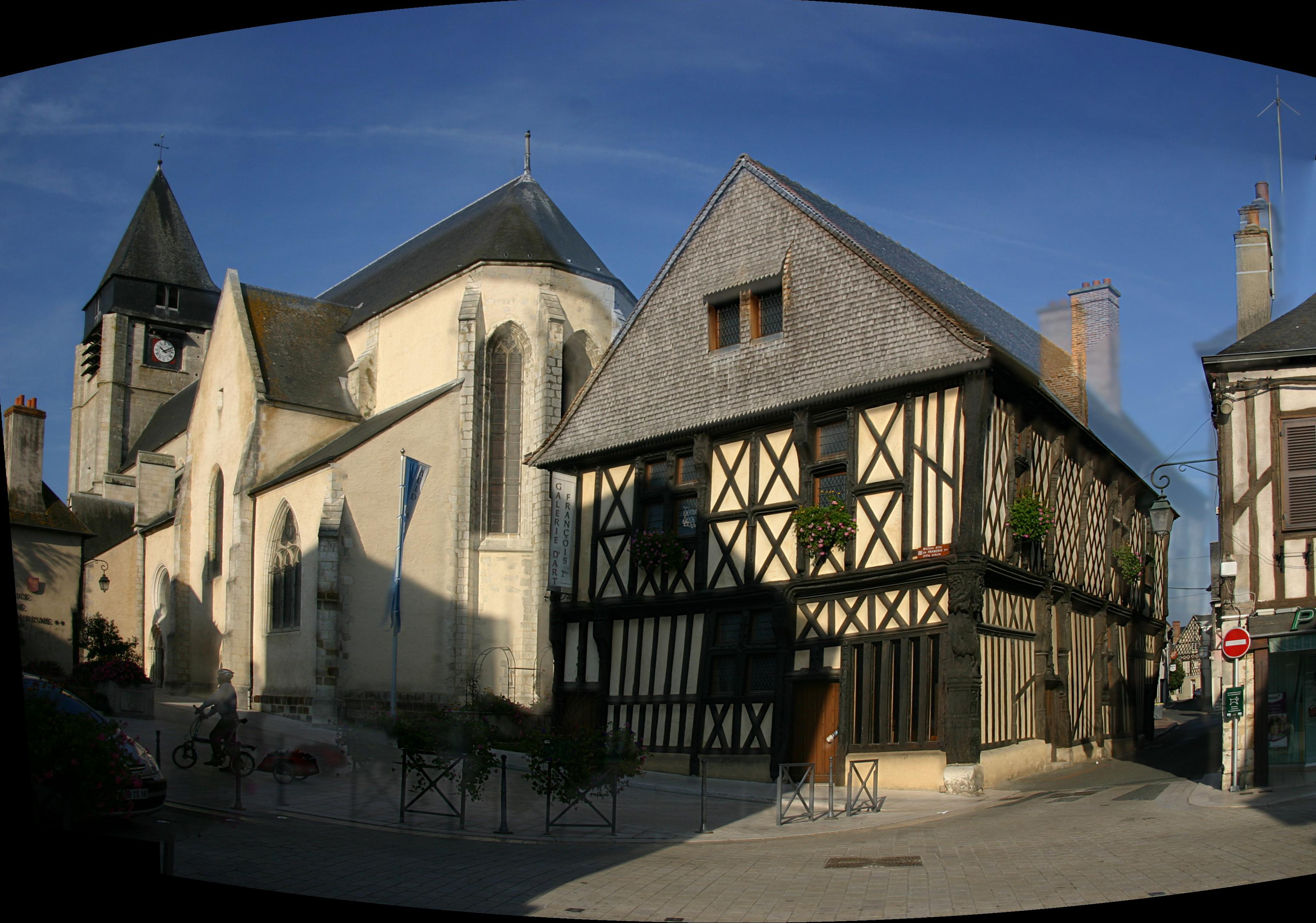 Aubigny-sur-Nère